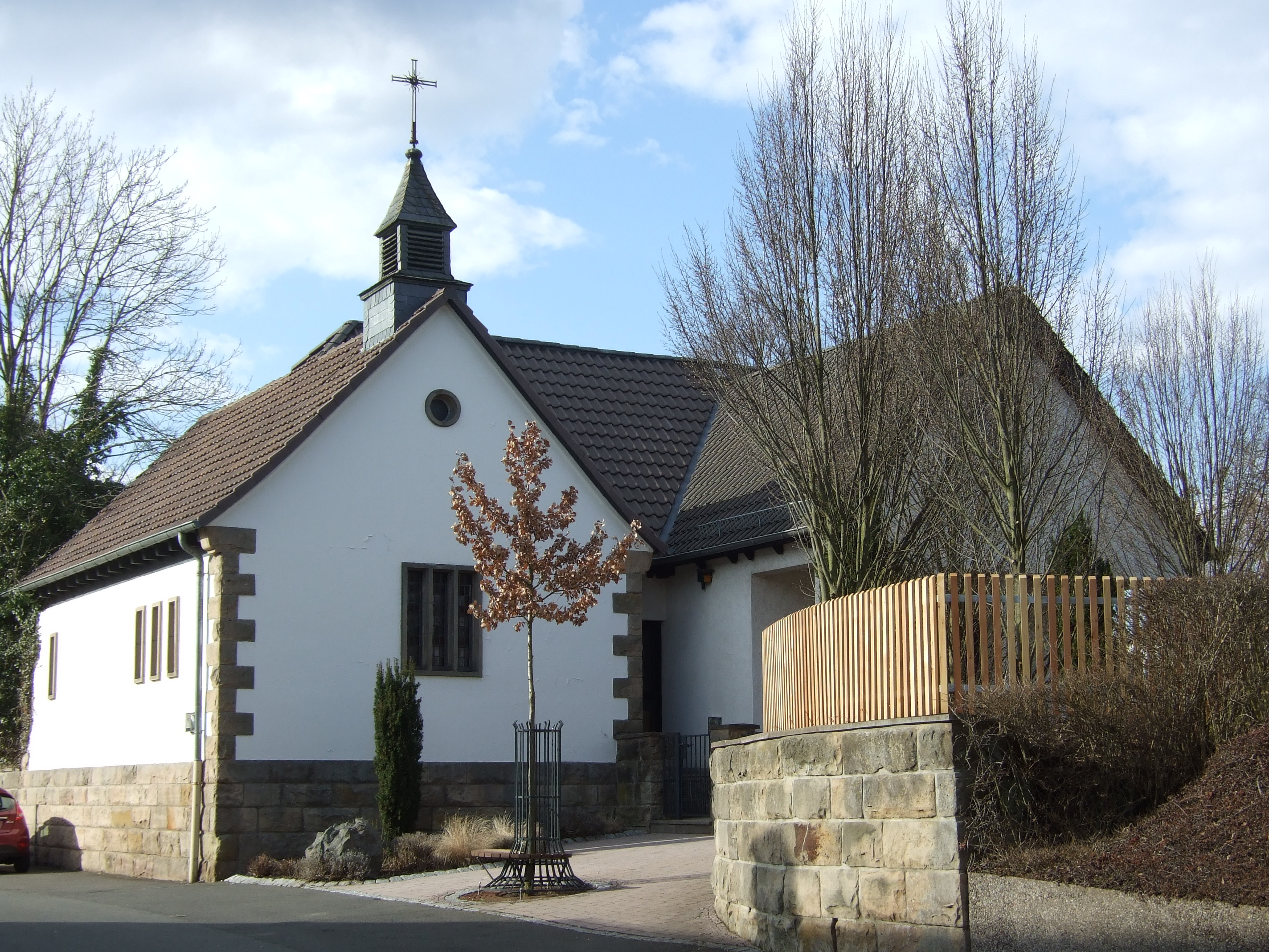 Friedhofskapelle in Wellerode